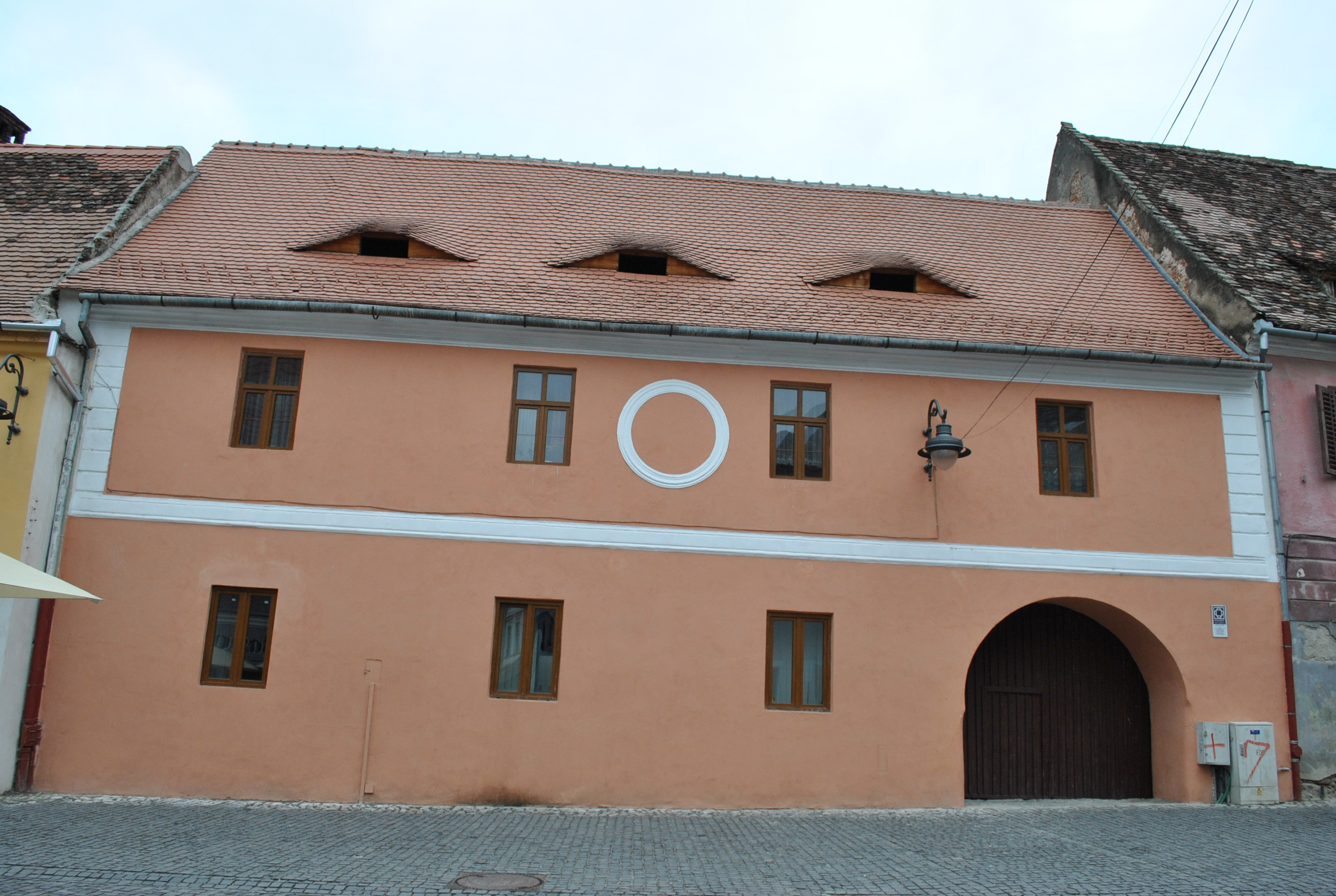 Casă, sec. XV, a doua jum. A sec. XIX, 1860